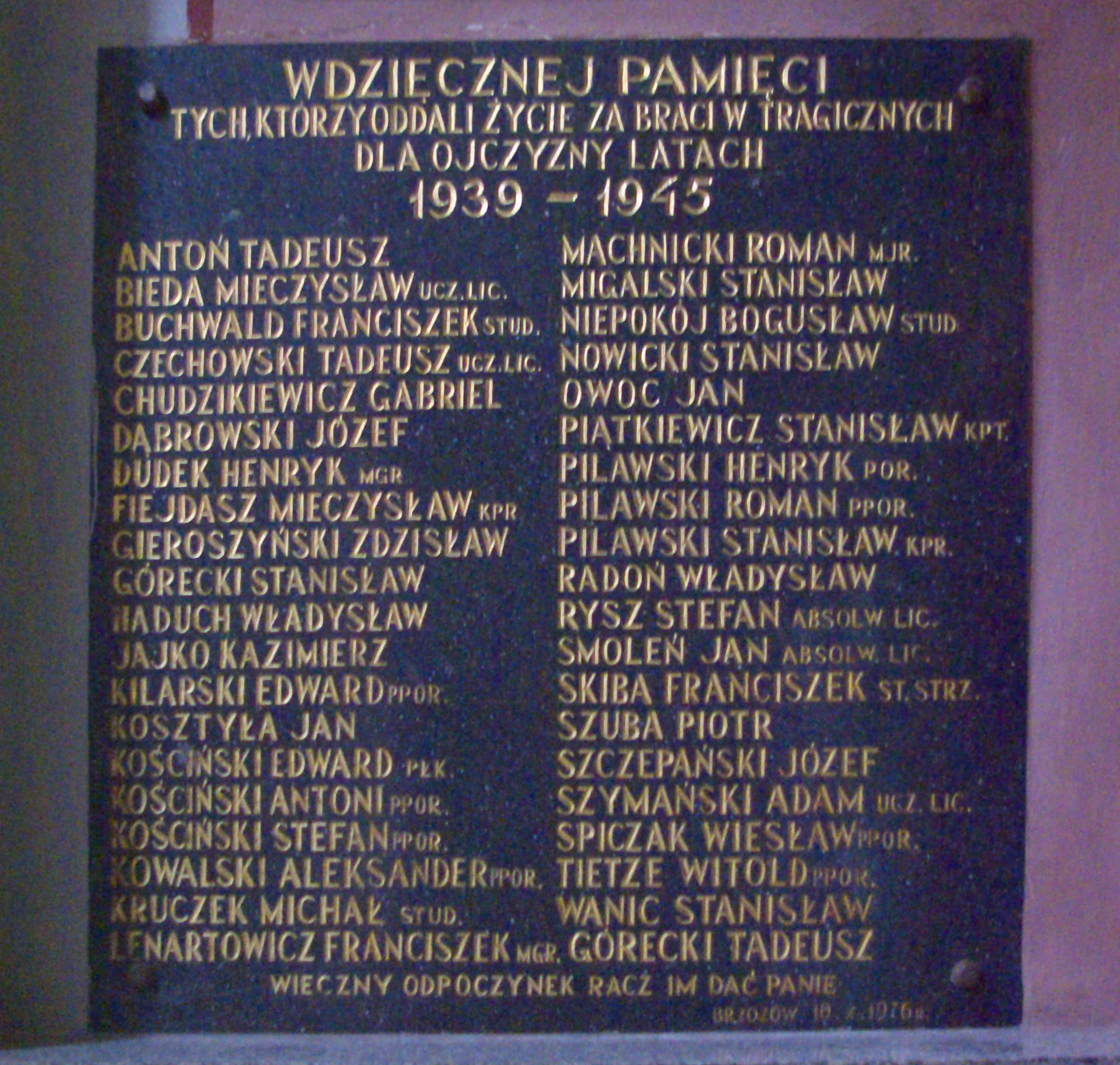 Tablica upamiętniająca ofiary wojny z lat 1939-1945 w kościele Przemienienia Pańskiego w Brzozowie